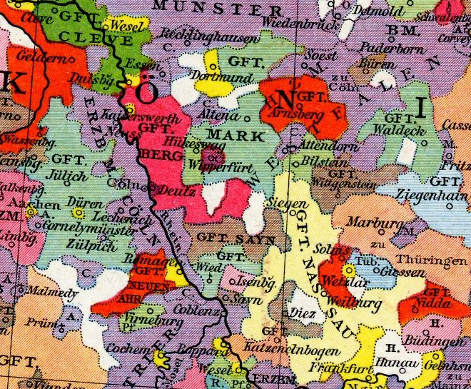 Deutschland im 13. Jahrhundert, Ausschnitt Grafschaft Berg